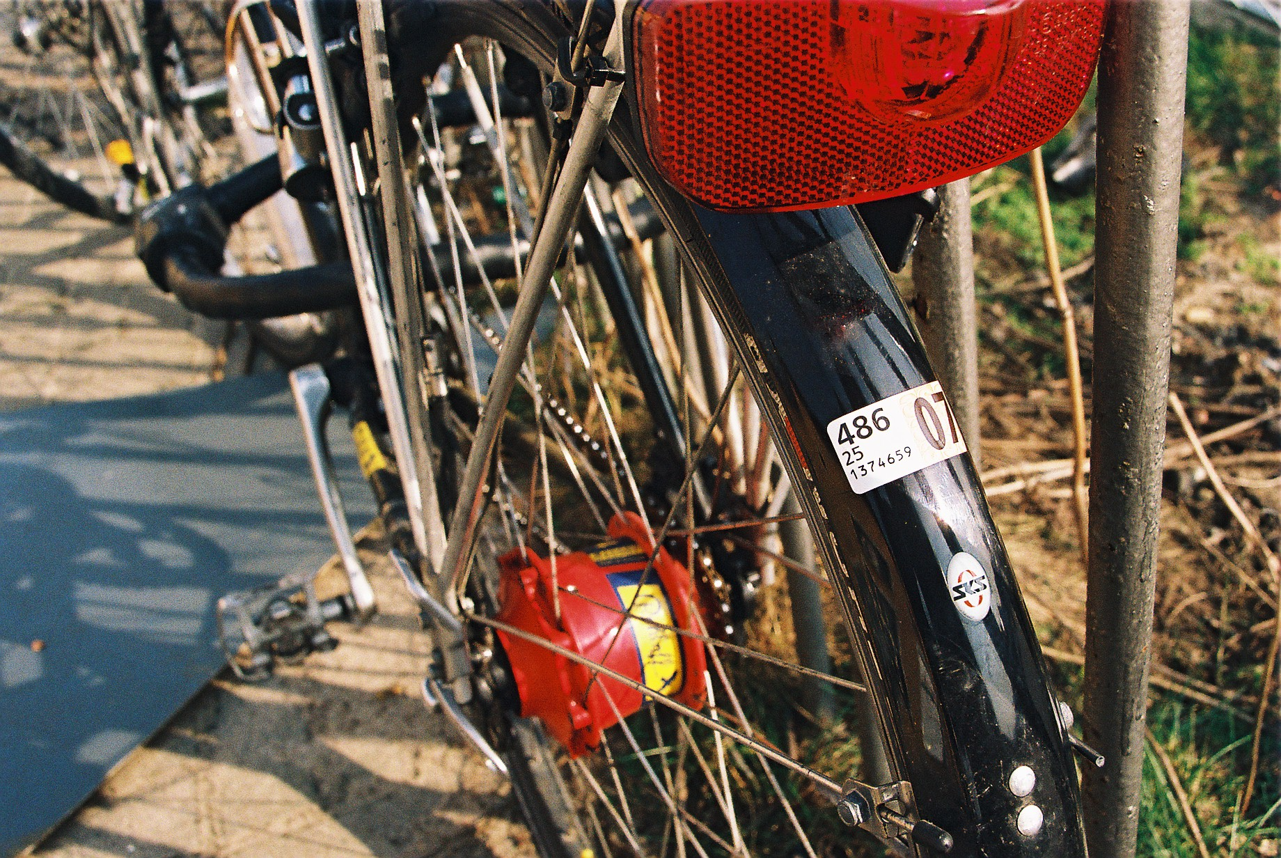 Velovignette 2007 am Fahrrad